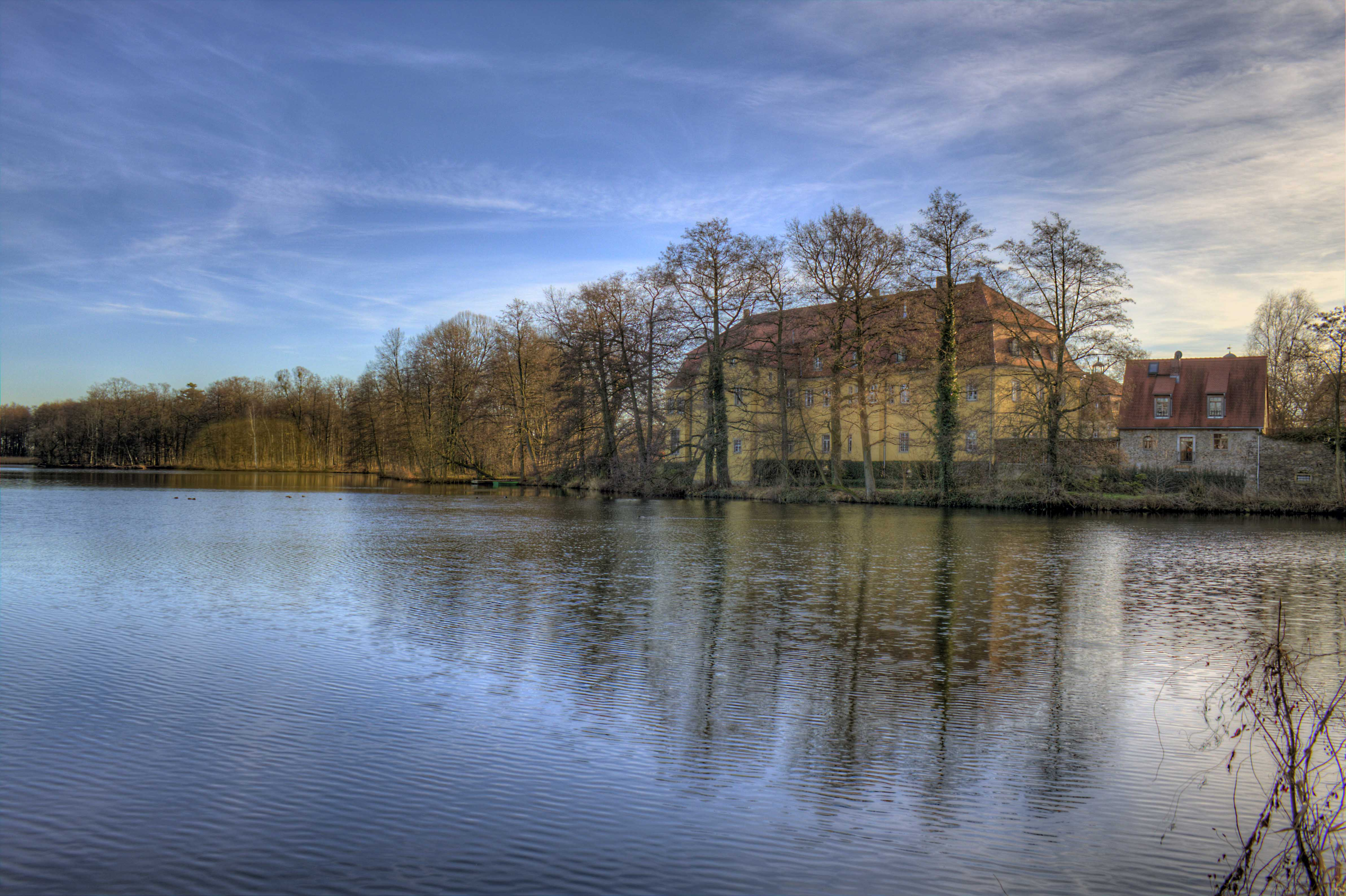 Schloss Heyda, Stolpener Straße 13 in Lossatal OT Heyda